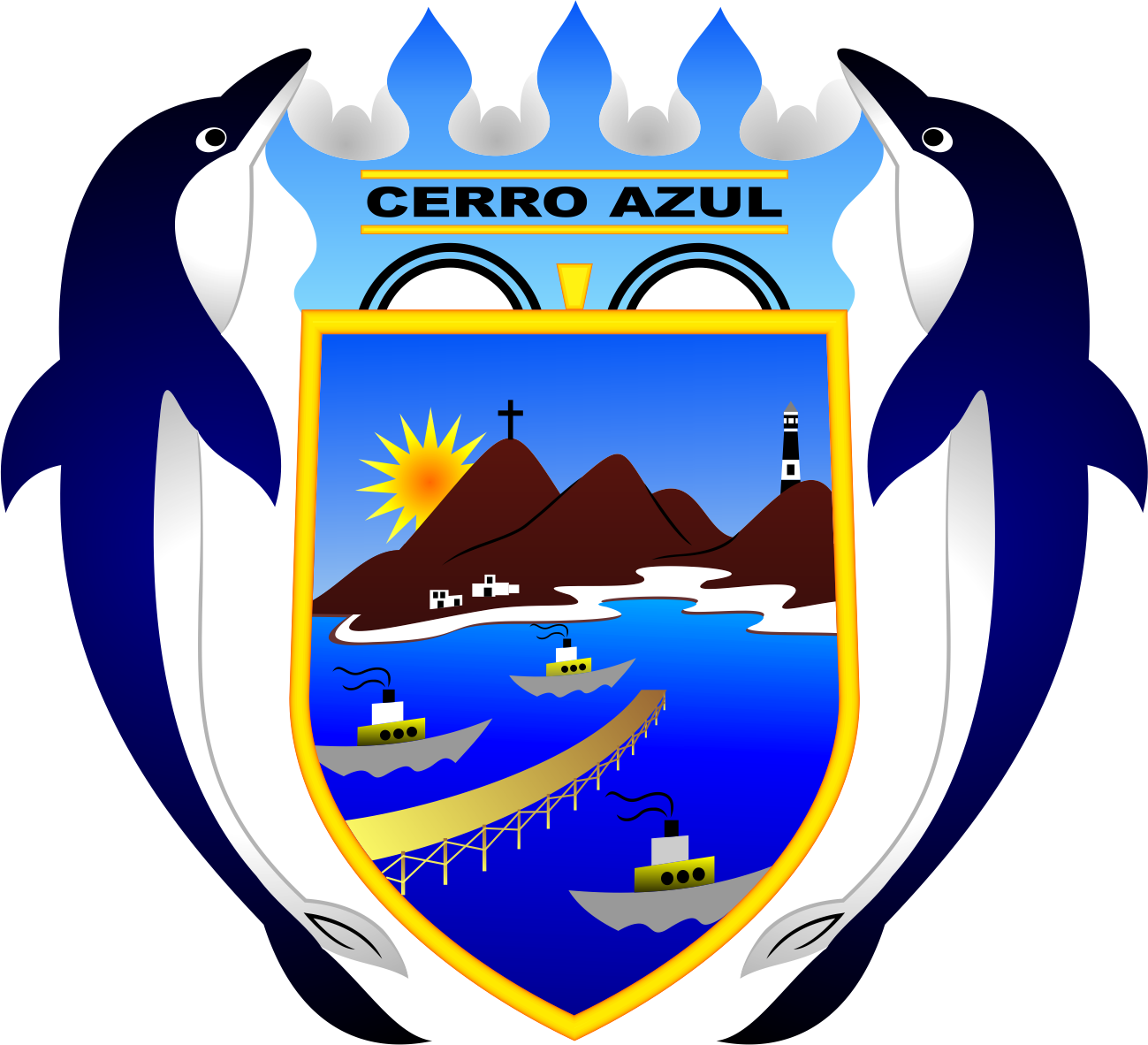 Distrito de Cerro Azul - Provincia de Cañete - Región Lima